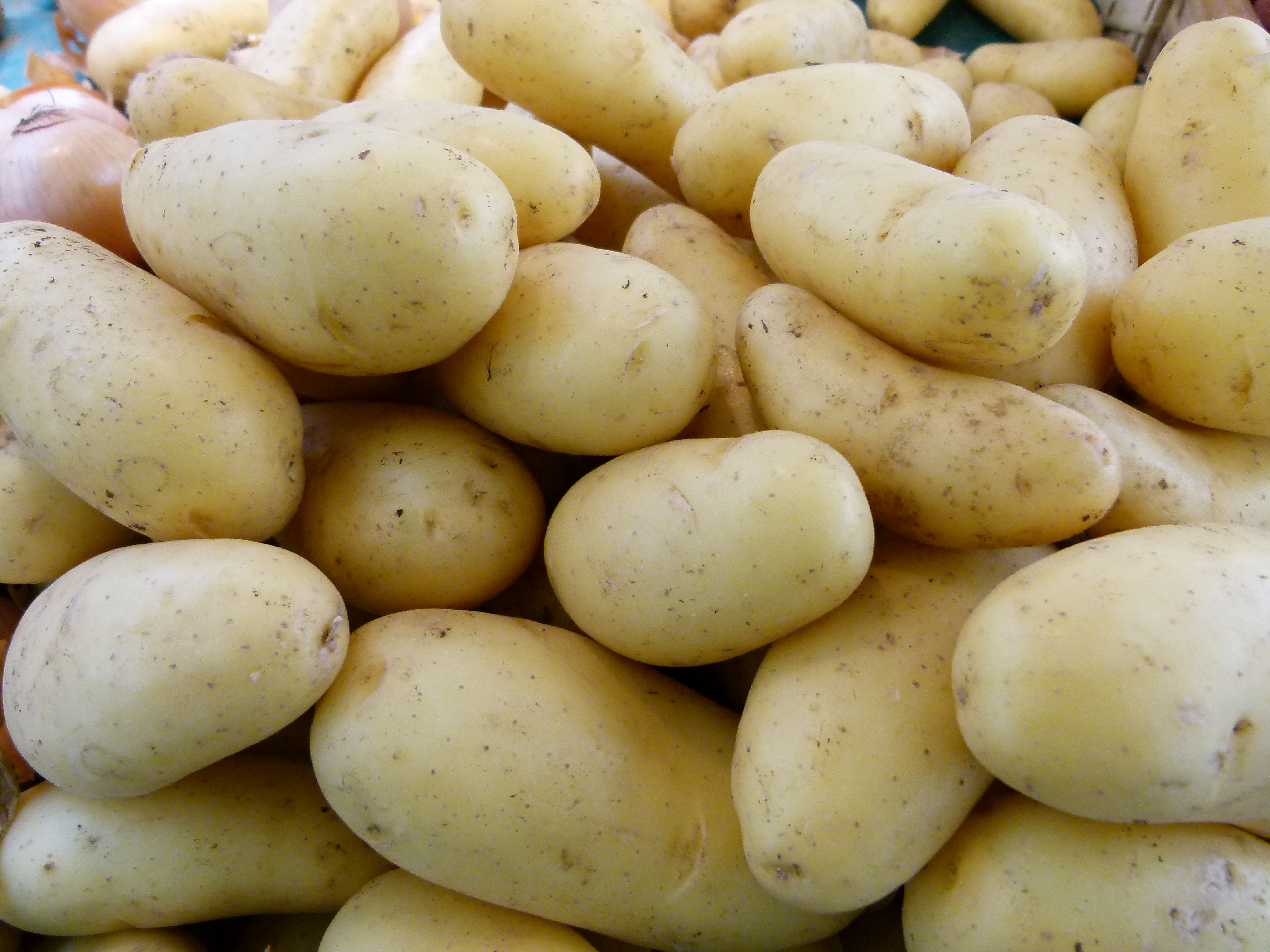 Au marché - pommes de terre